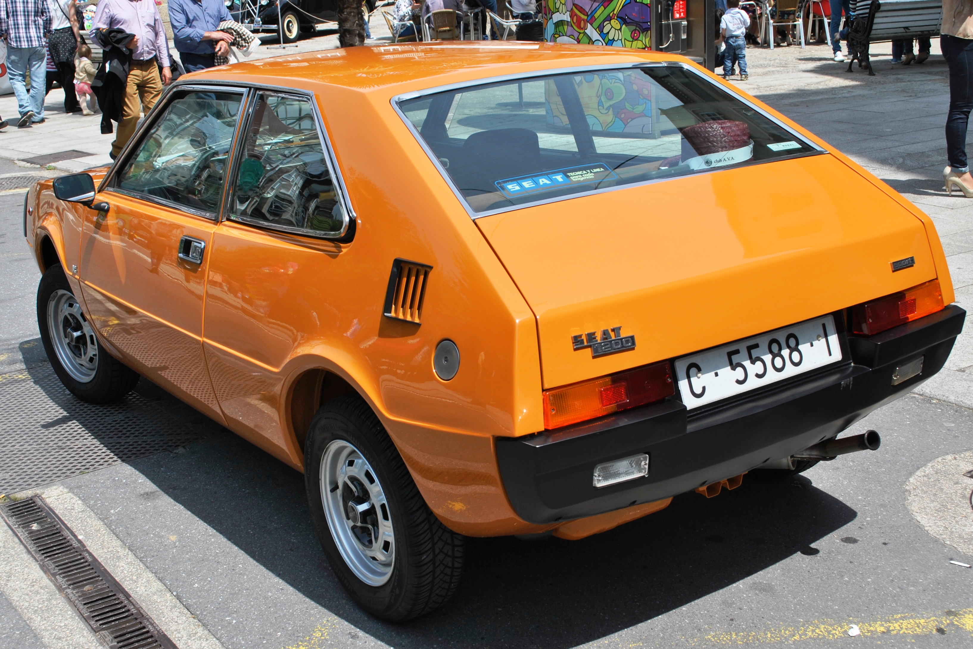 Véxase o título e as categorías.